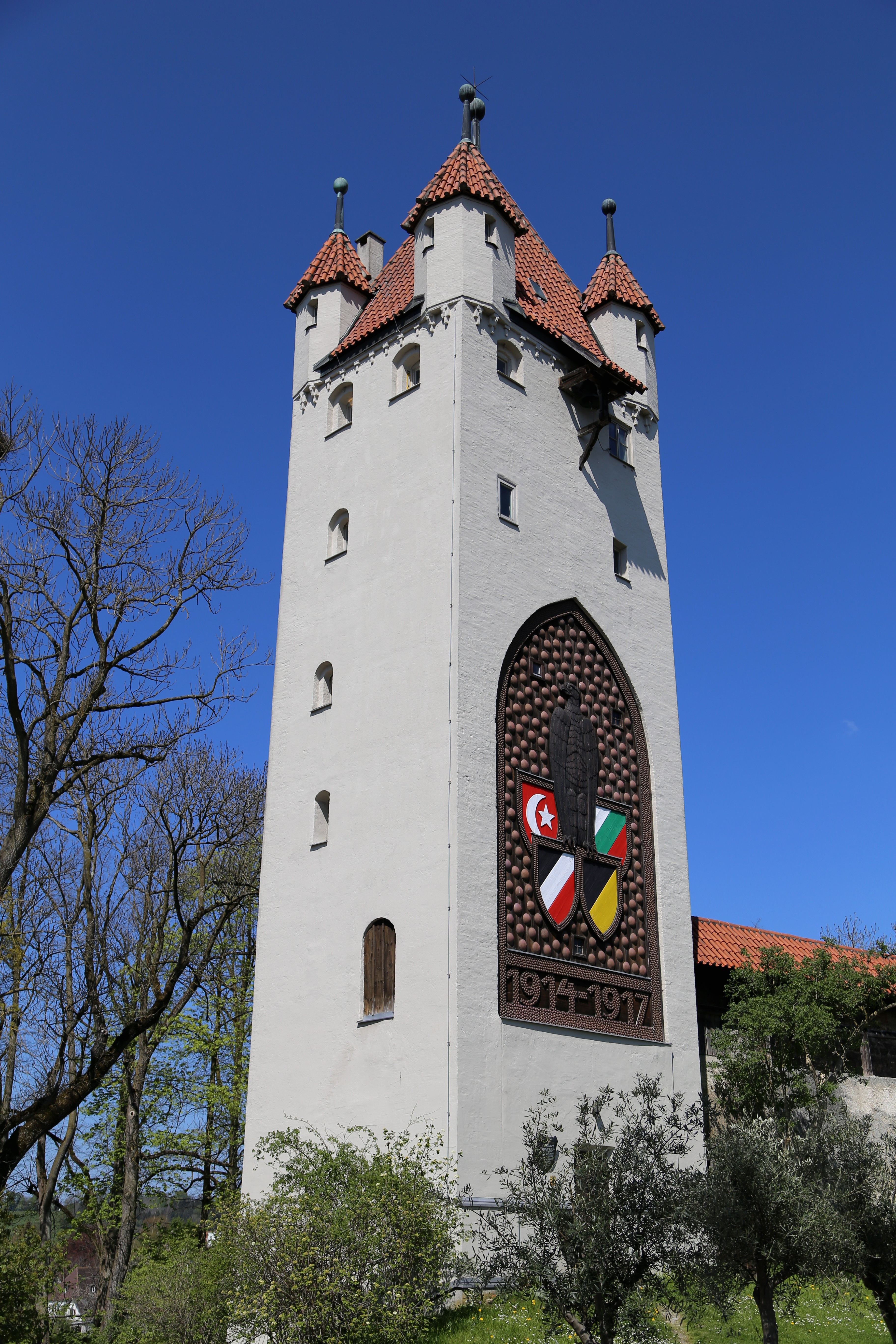 Afraberg 9, Kaufbeuren; Fünfknopfturm, Turm der Stadtbefestigung, sechsgeschossiger, vierseitiger Massivbau mit Zeltdach und polygonalen Scharwachttürmchen mit Zeltdächern an den Ecken, an der östlichen Seite großer, ehemals offener Spitzbogen, um 1420